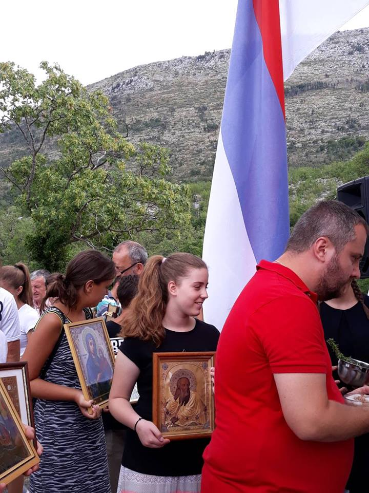 Требијови